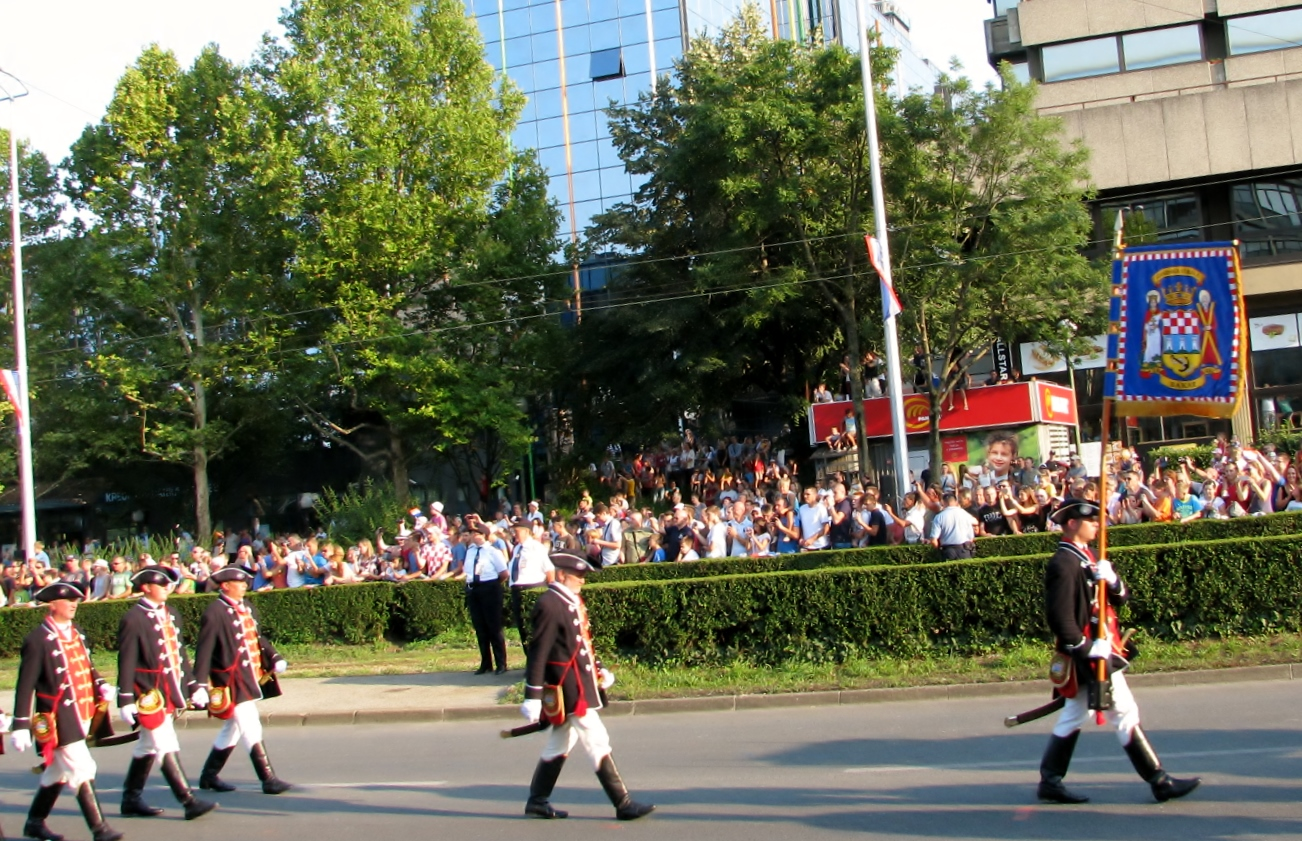 Gradska straža Bakar na svečanom mimohodu u Zagrebu, 4. kolovoza 2015.